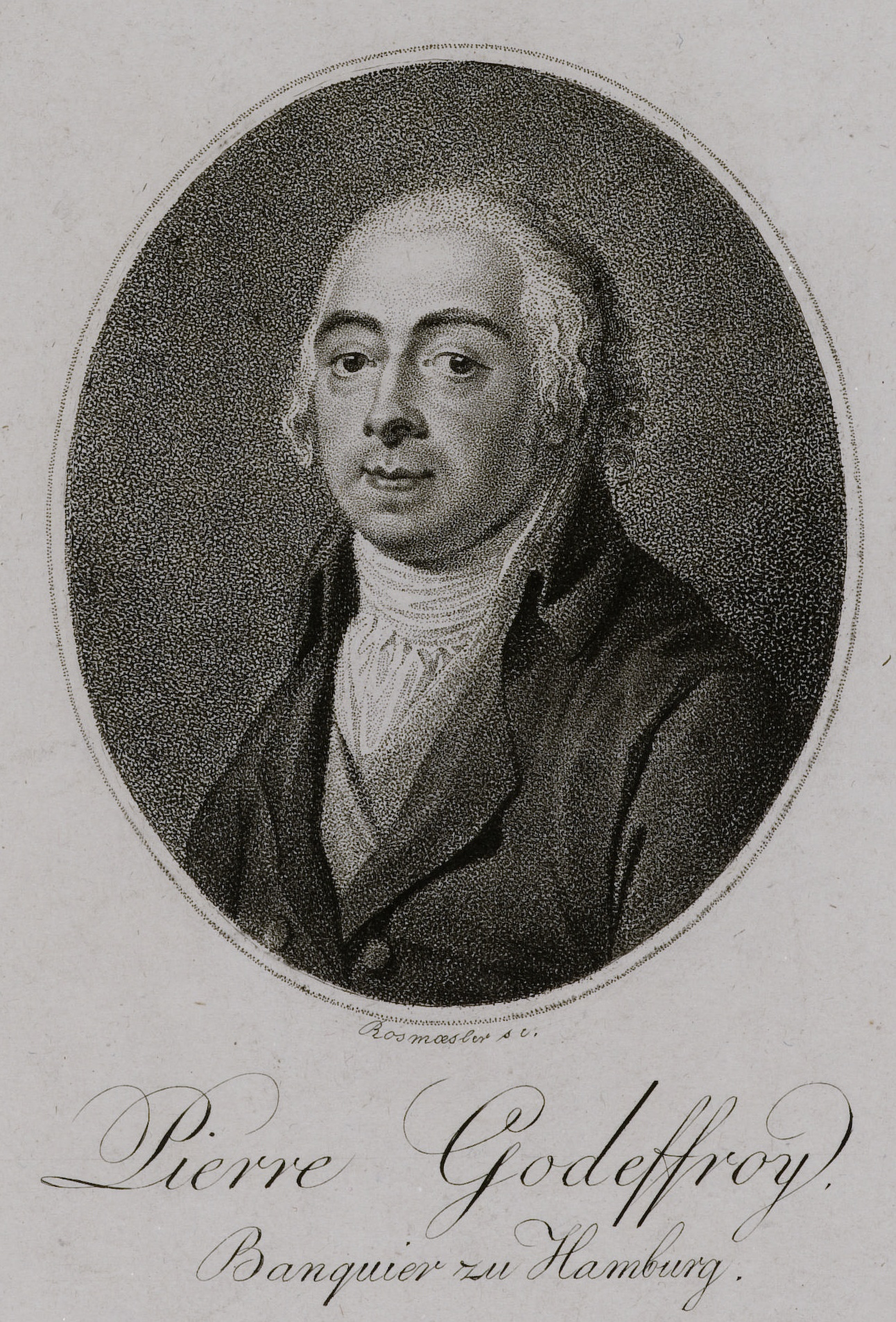 Pierre Godeffroy